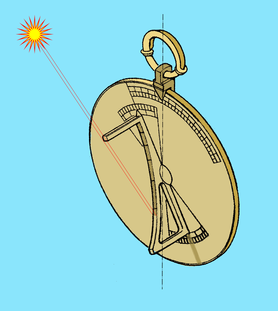 Après mise en station et orientation, lecture de l'heure temporaire (après 5 h).